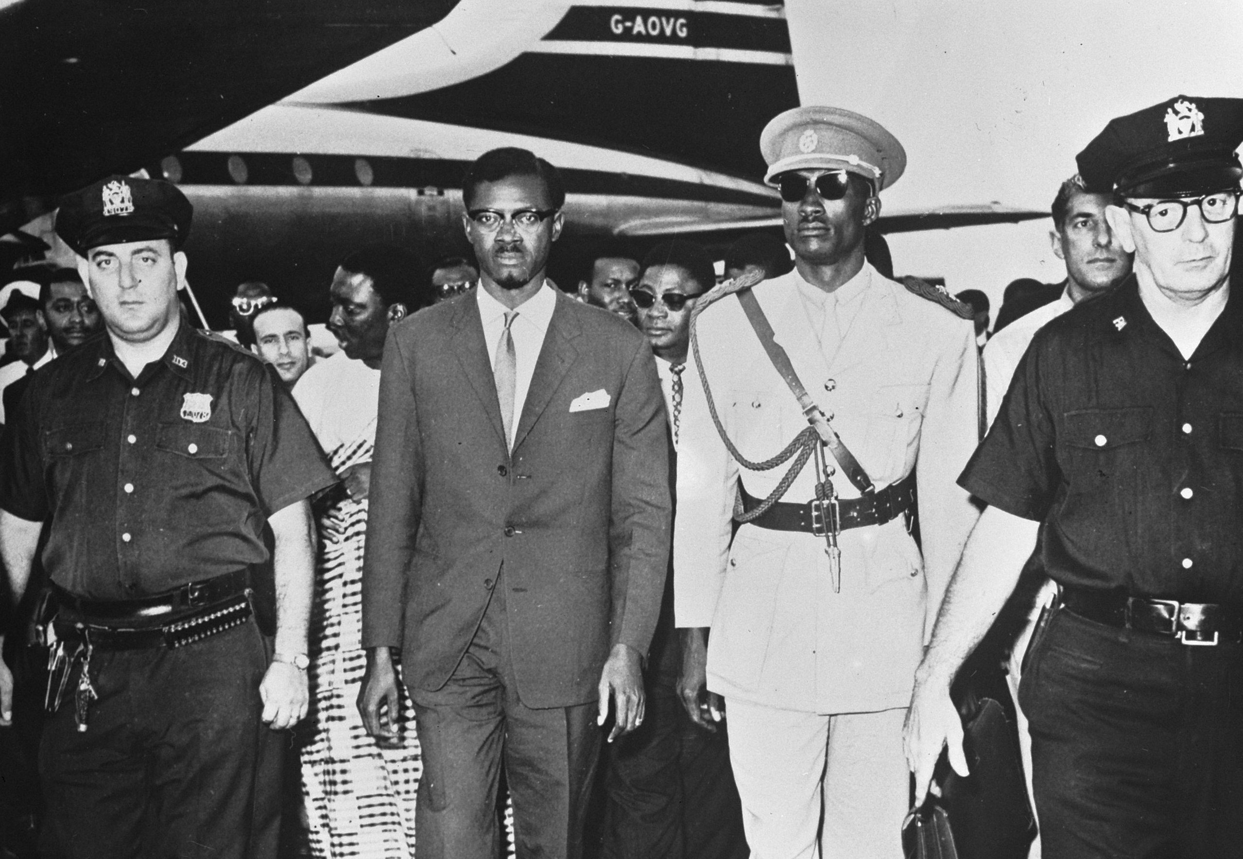 Collectie / Archief : Fotocollectie Anefo Reportage / Serie : [ onbekend ] Beschrijving : Aankomst Lumoemba in New York Datum : 20 november 1961 Locatie : New York, Verenigde Staten Persoonsnaam : Lumoemba, Patrice Fotograaf : Fotograaf Onbekend / Anefo Auteursrechthebbende : Nationaal Archief Materiaalsoort : Glasnegatief Nummer archiefinventaris : bekijk toegang 2.24.01.09 Bestanddeelnummer : 913-2033